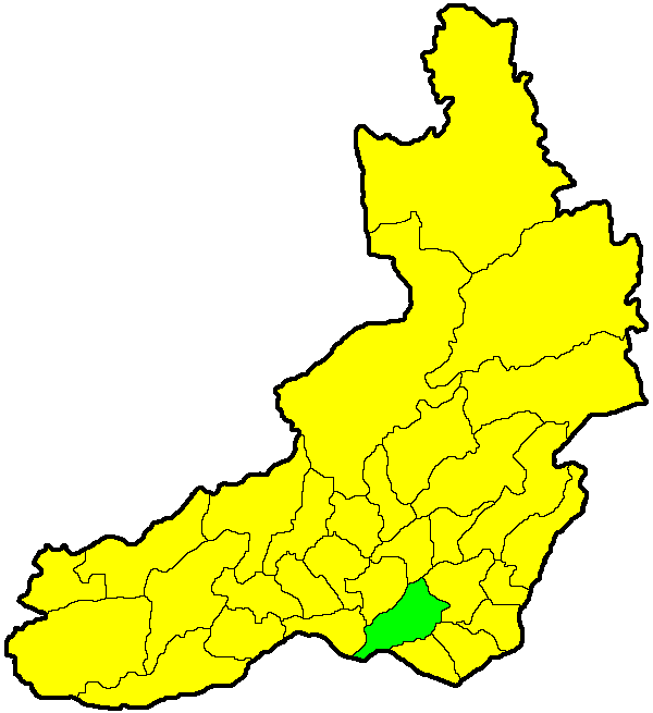 Борзинский район на карте Забайкальского края